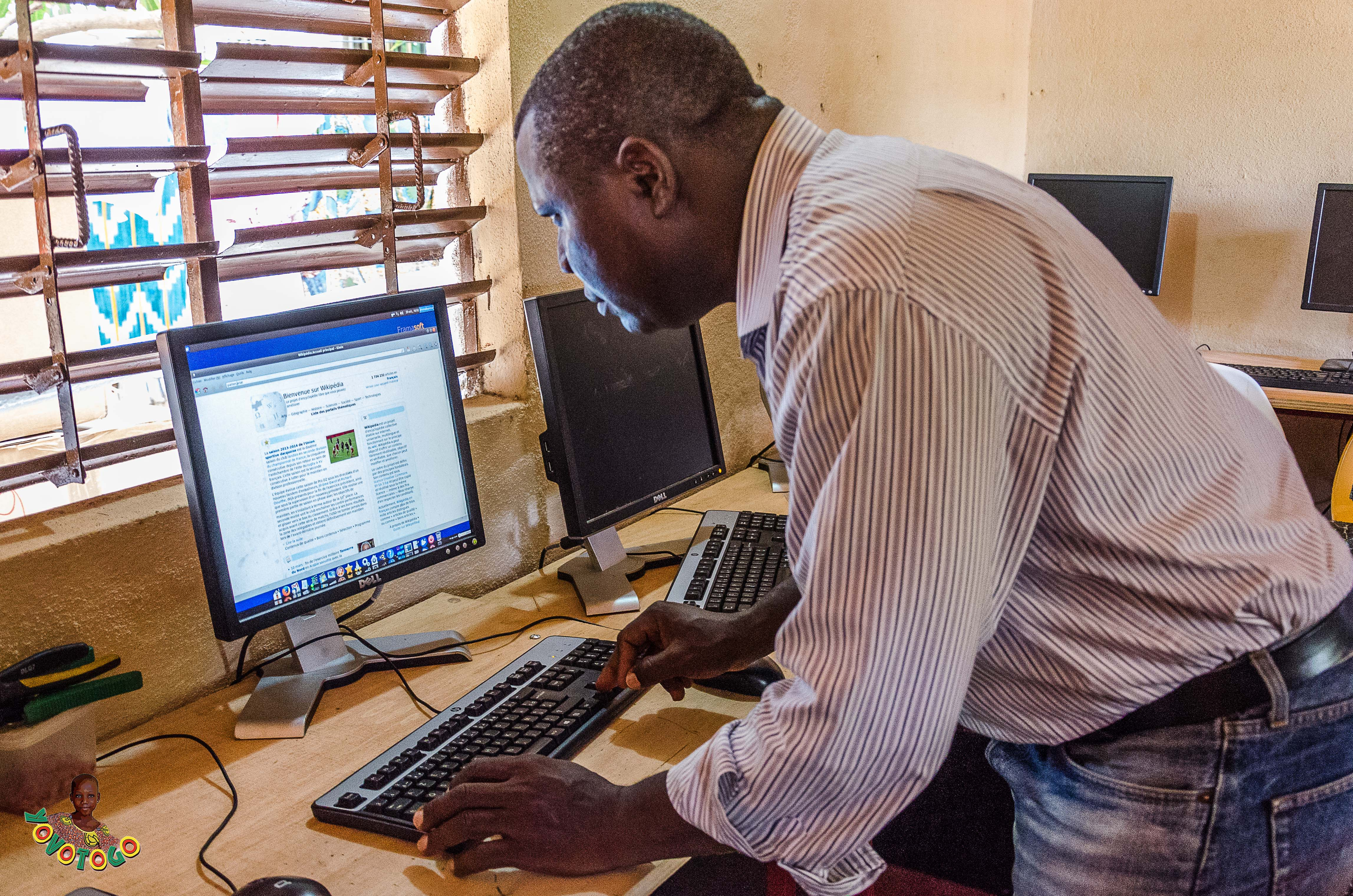 Le secrétaire général de la mairie de Dapaong consulte la page de sa ville lors de l'inauguration de la salle multimédia de JUMP Lab'Orione (Jeunes Unis pour un Monde de Progrès), équipée en partenariat avec l'Association YovoTogo & le Collectif Emmabuntüs. L'encyclopédie francophone Wikipédia hors-connexion est intégrée à Emmabuntüs via Kiwix.